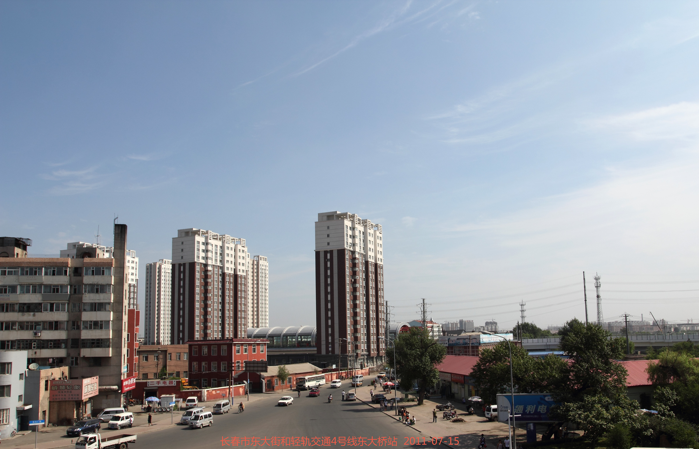 长春市东大街 轻轨交通4号线东大桥站